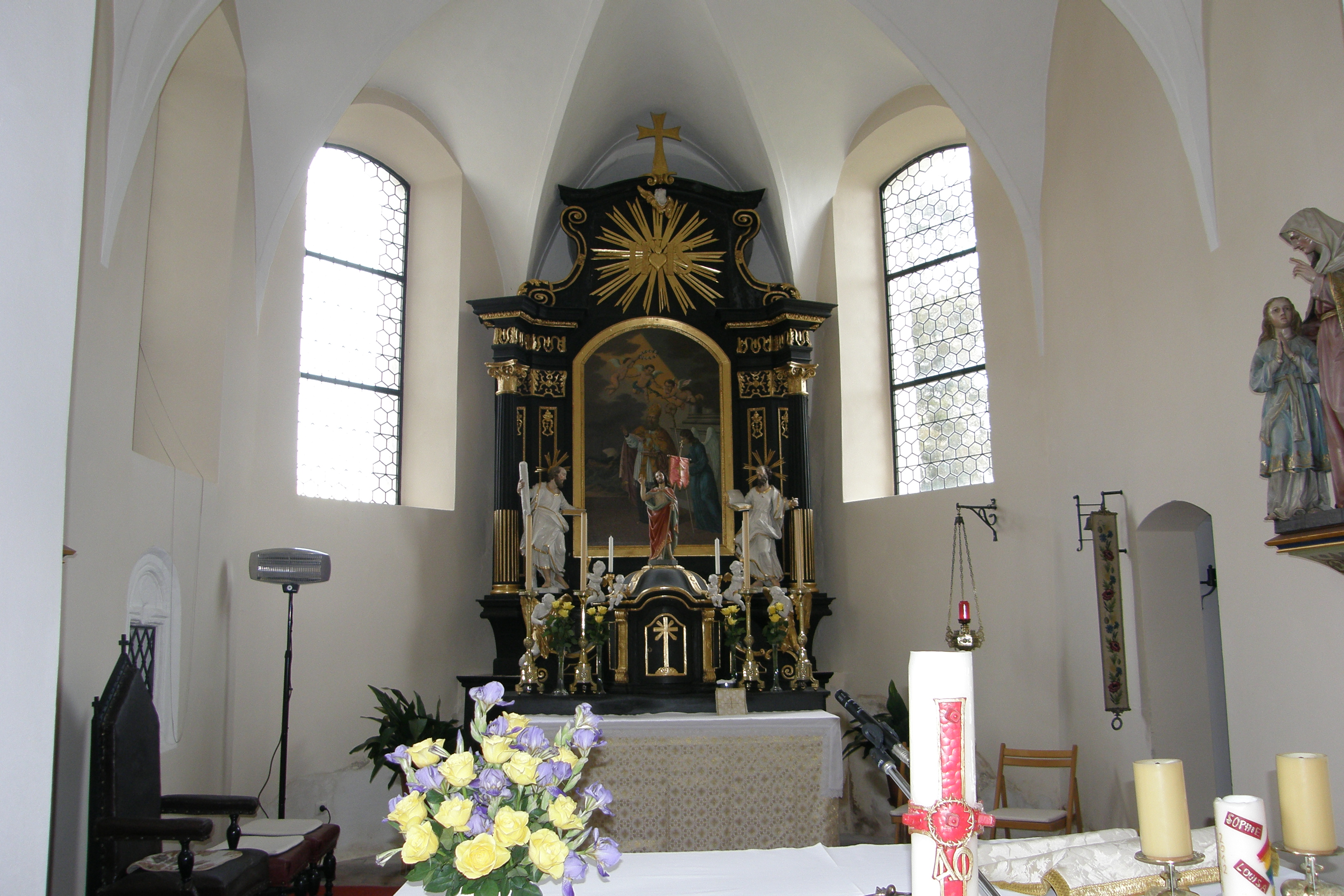 Kath. Pfarrkirche hl. Nikolaus